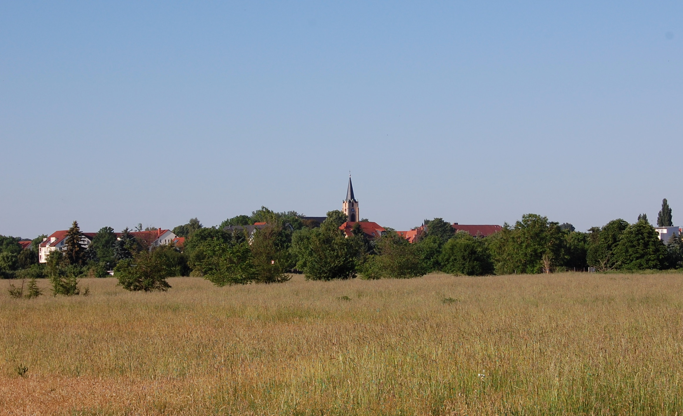 Blick auf den Ortskern von Salbke vom Elberadweg, Blick aud Nordost